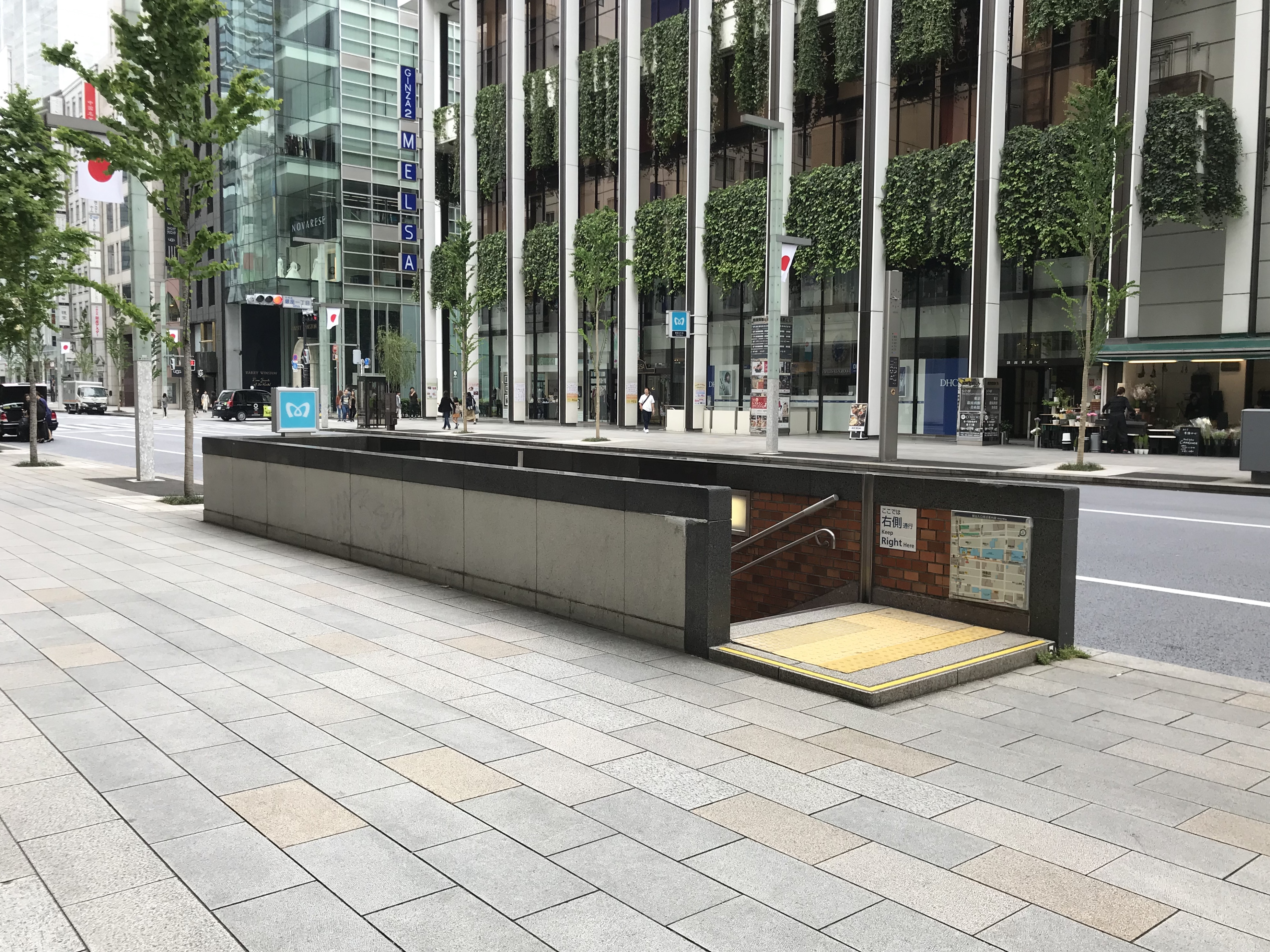 東京メトロ有楽町線銀座一丁目駅8番出入口